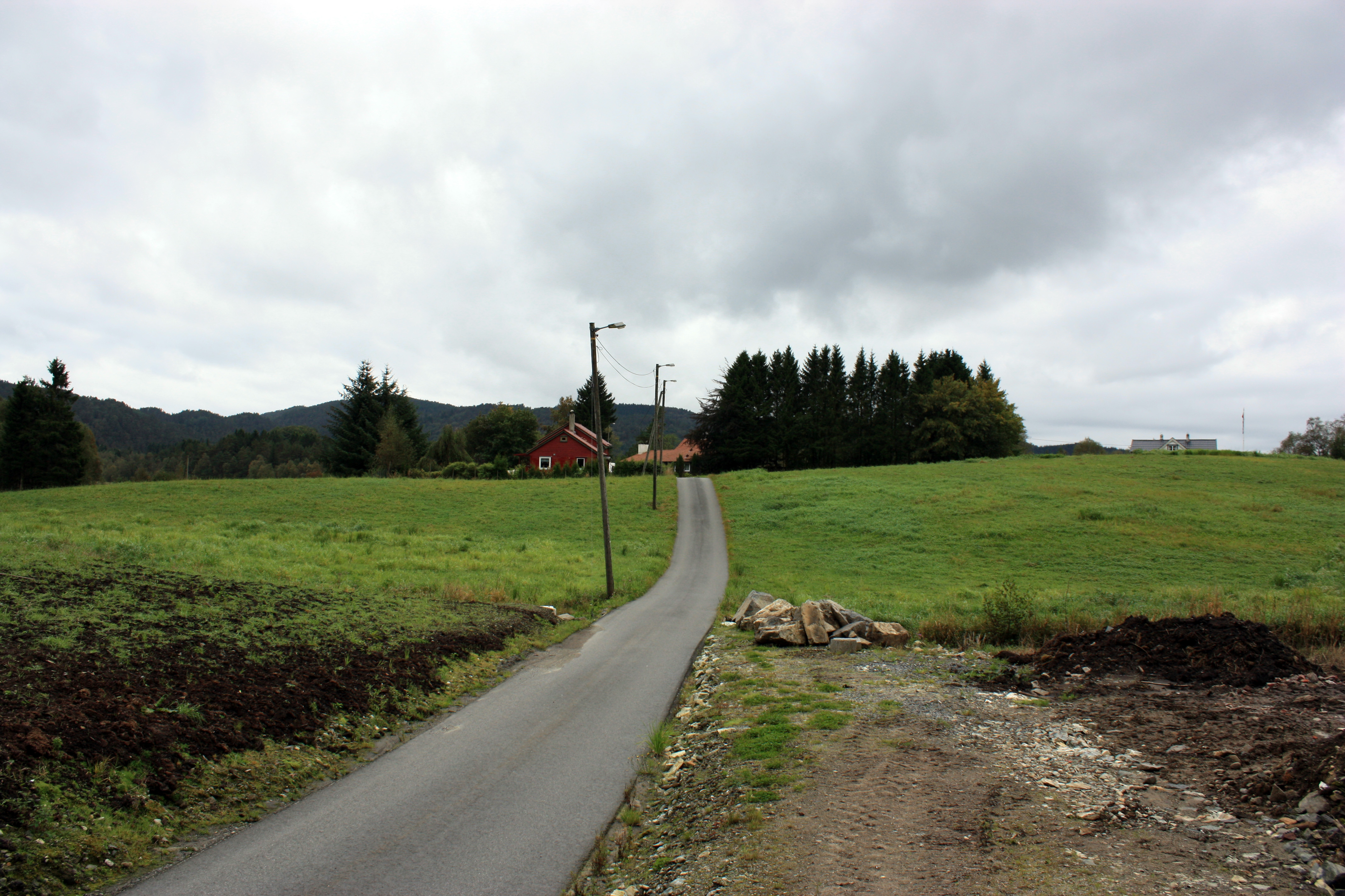 Kalandsneset, Fana, Bergen.